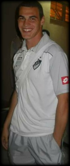 Futbolista Martin Gimenez